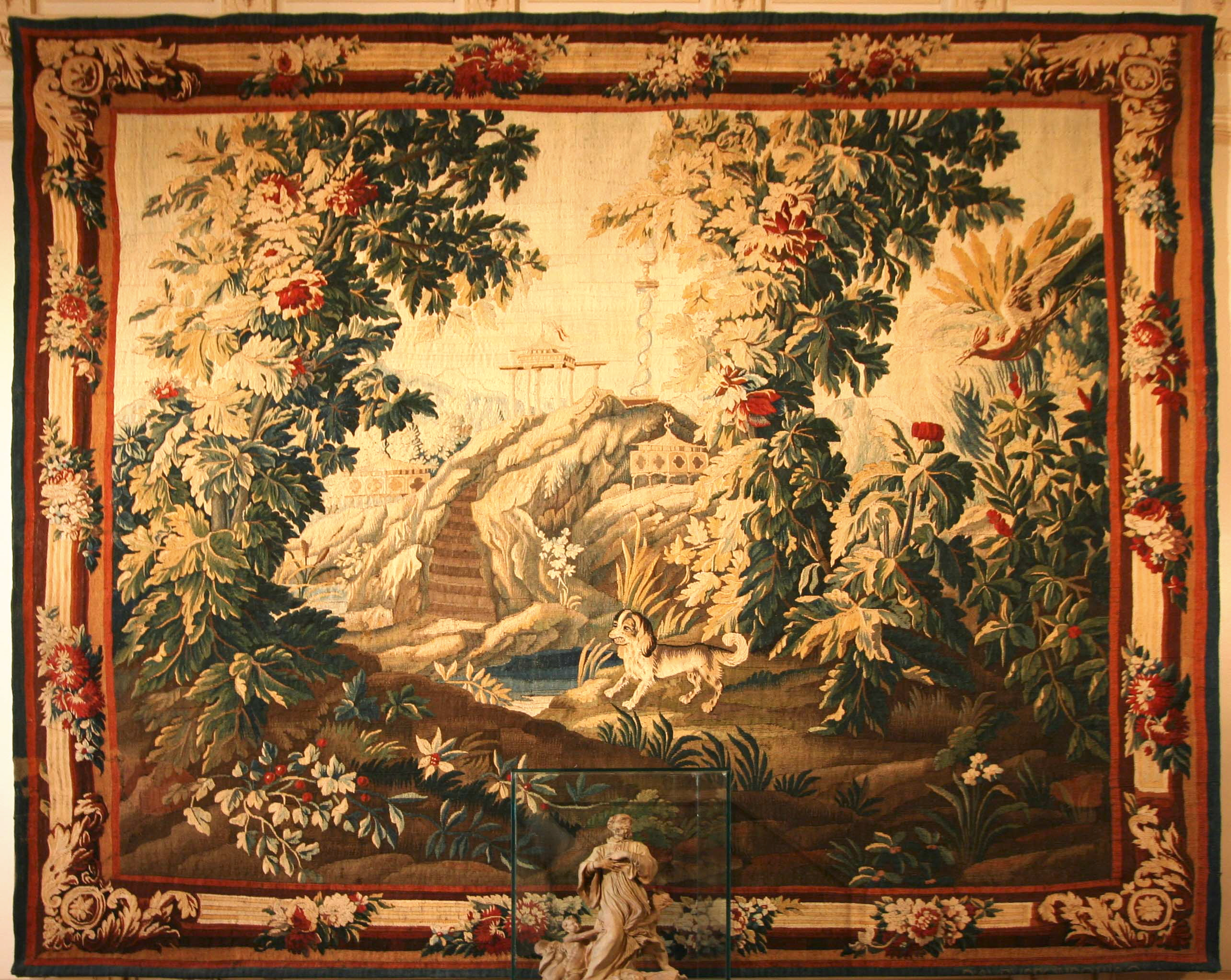 Tapisserie en laine de la manufature royale d'Aubusson représentant un paysage exotique avec chien; XVIIe siècle. Musée Grobet-Labadié à Marseille.